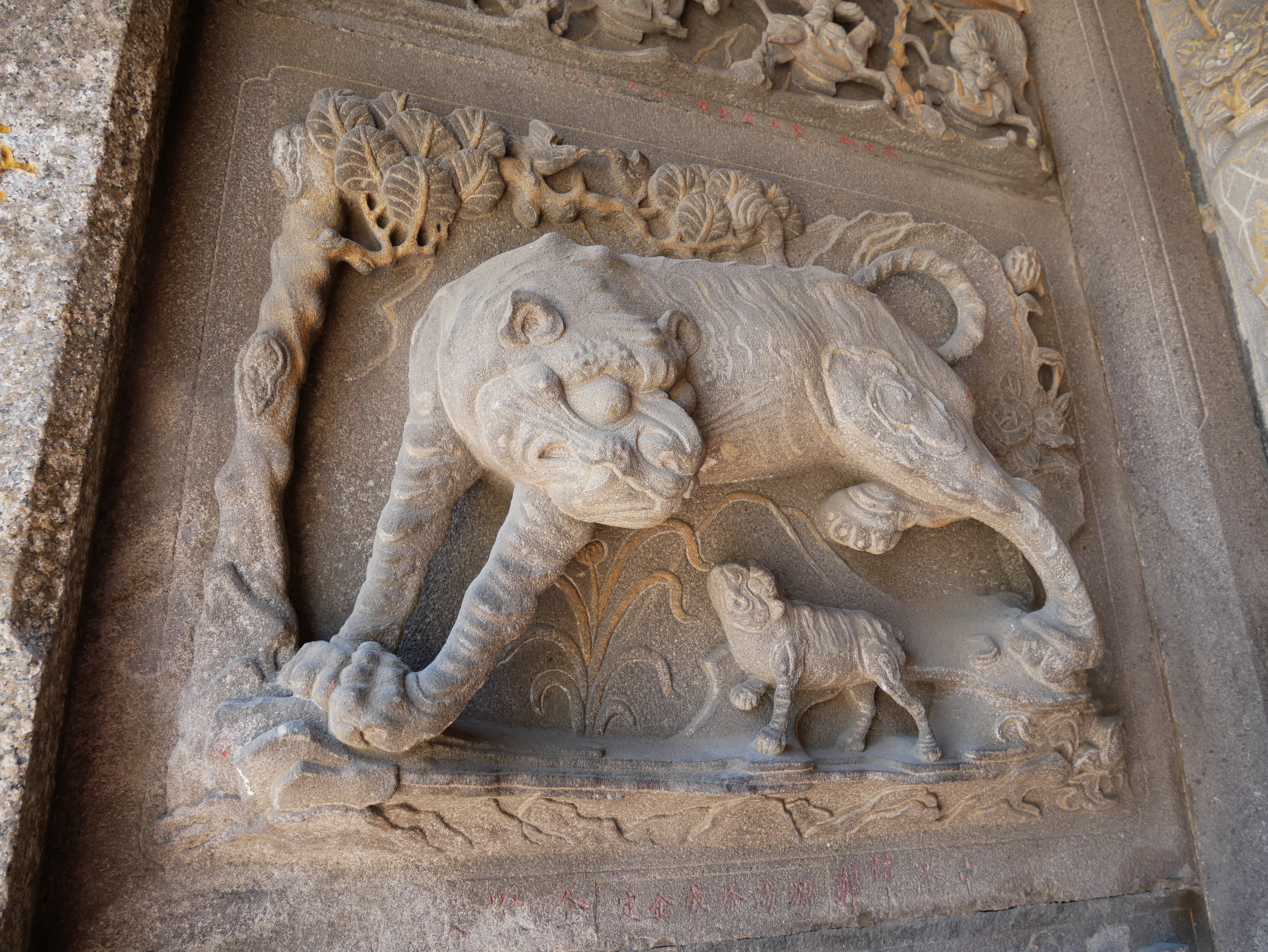 中港慈裕宮虎邊對看堵石雕，苗栗縣竹南鎮中美里